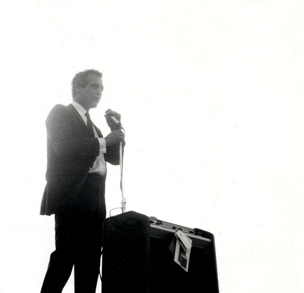 Autor: Photograph by Christopher Peterson. Izvor: Paul Newman at a political rally for Eugene McCarthy in the parking lot of Kohl's in Menominee Falls, Wisconsin, 1968. Проверено на Фликеру 5.11.2007. --Dzordzm 05:42, 5. новембар 2007. (CET)